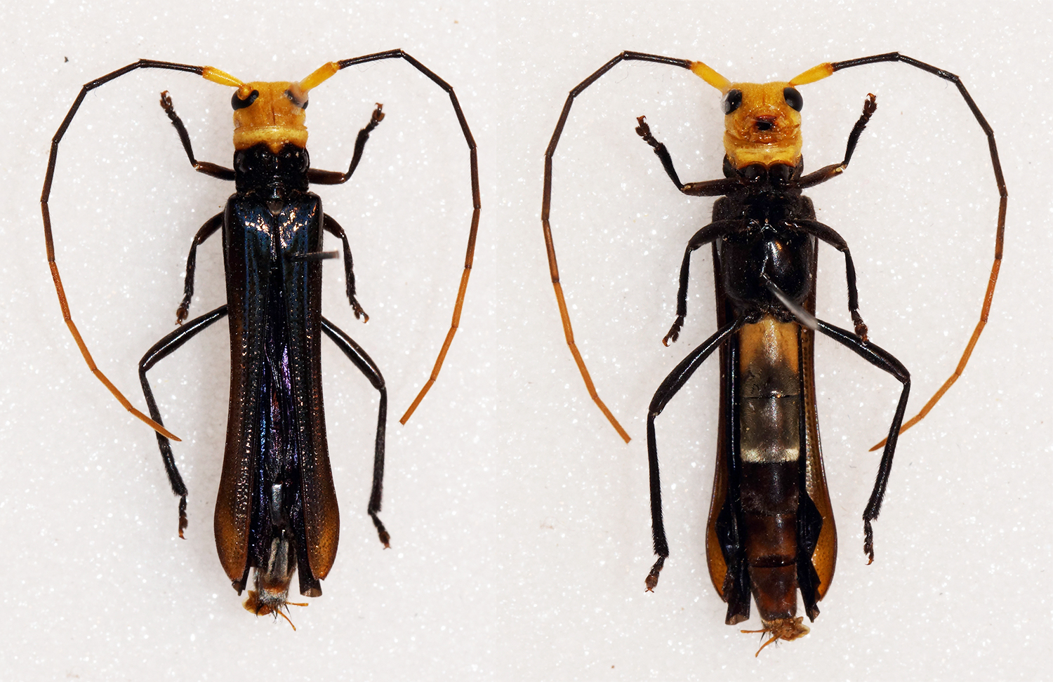 Jordan,1894 Sex: Male Data: 10-2014 - Ebogo Centre - Cameroon Size: 19.5mm